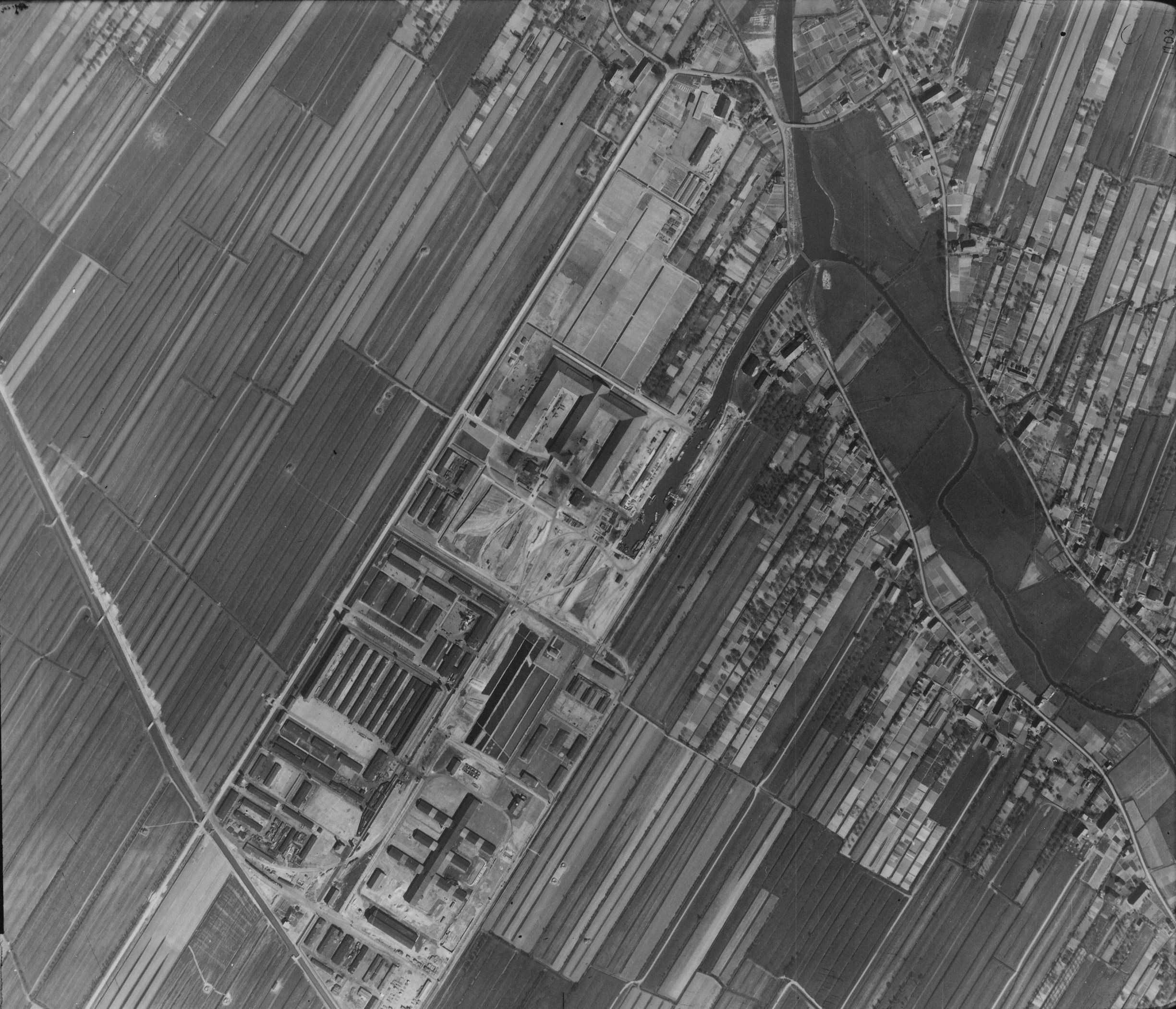 Luftaufnahme der Britischen Armee vom KZ Neuengamme kurz vor dessen Räumung.